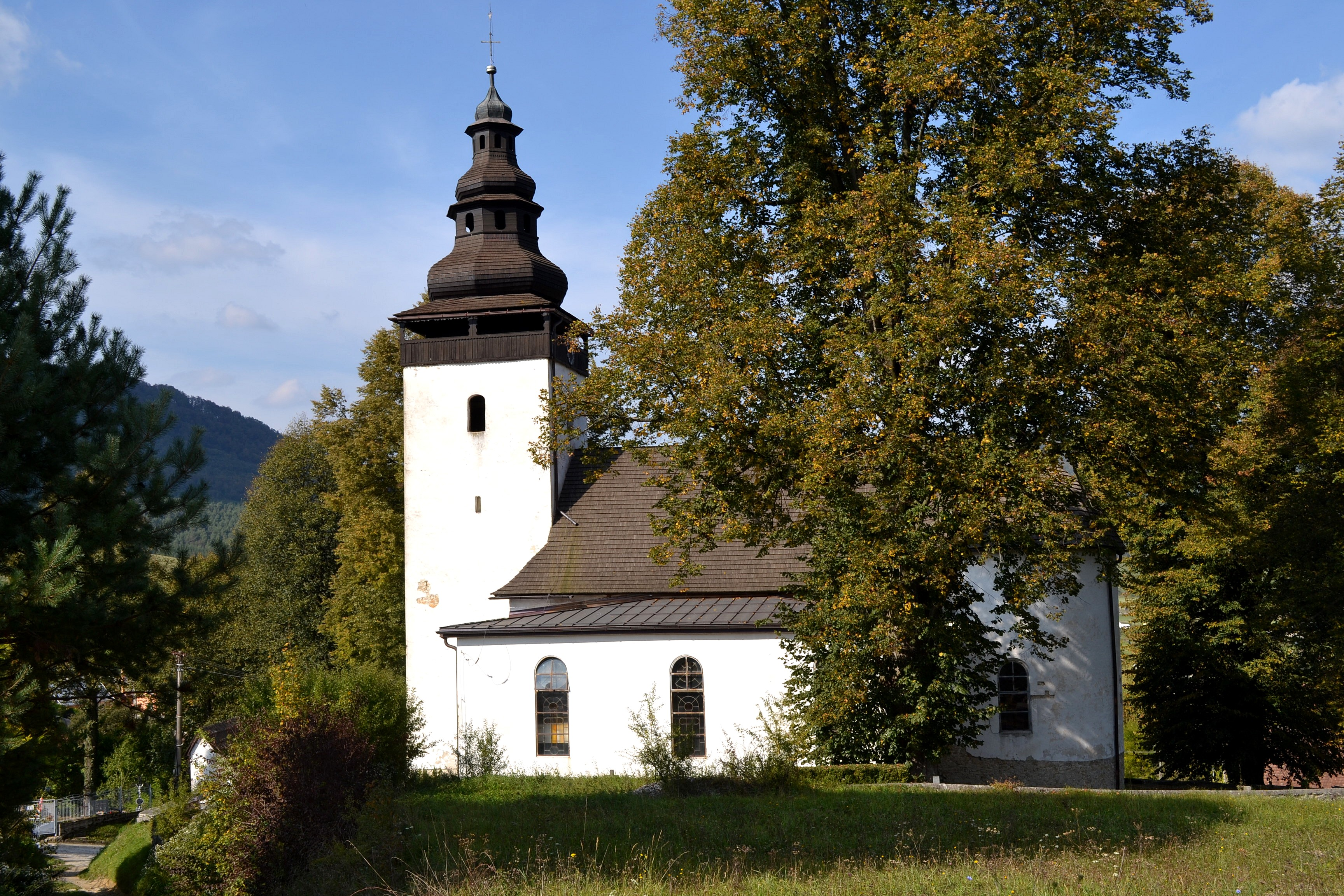 Domaniža (okr. Považská Bystrica), Kostol svätého Mikuláša; pohľad z juhu